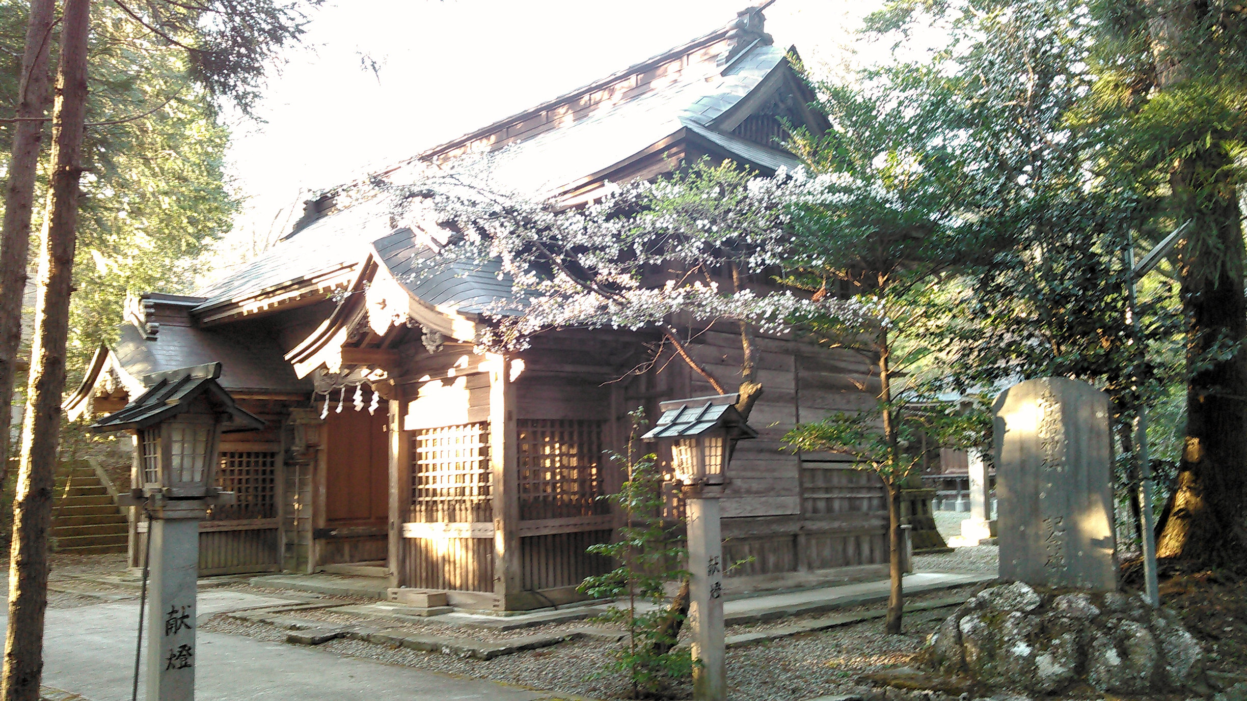 郡山市逢瀬町の菅船神社 絵馬殿・建惣門（随神門）